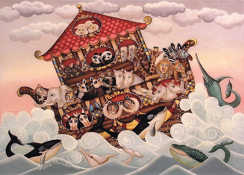 tableau